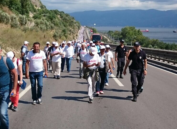 Adalet yürüyüşü, Cumhuriyet Halk Partisi Genel Başkanı Kemal Kılıçdaroğlu'nun Ankara'dan İstanbul'a kadar adalet talebiyle yürümesi olayıdır.